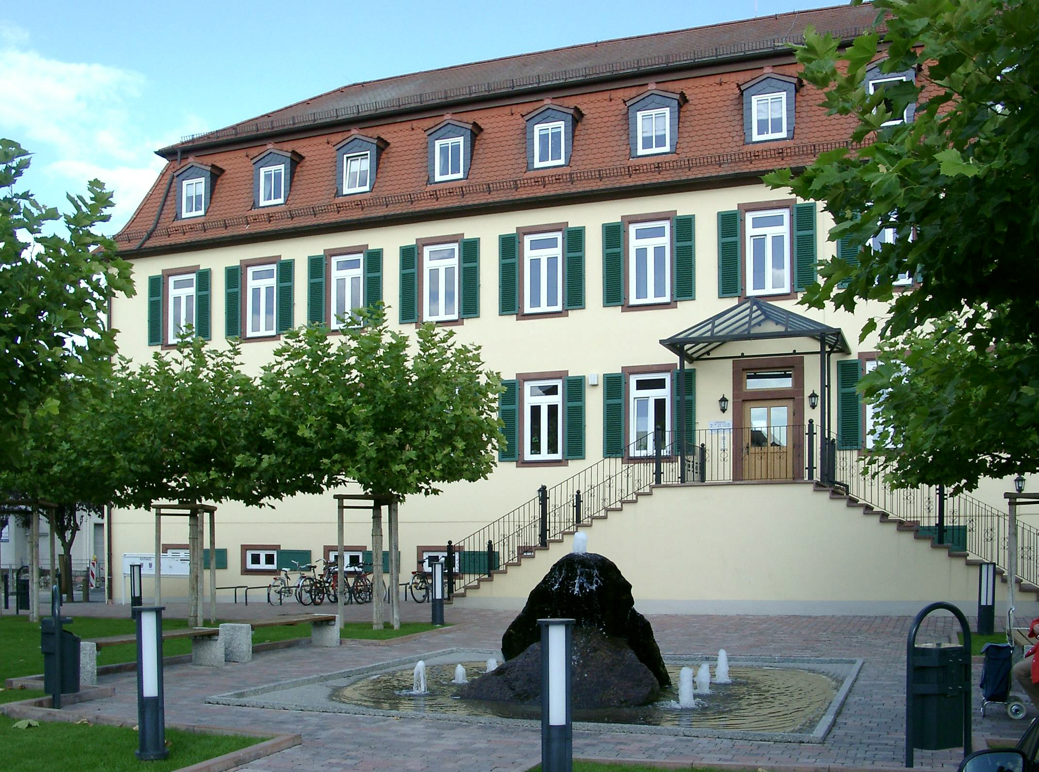 Bickenbach (Bergstraße), ehemaliges Jagdschloss der Landgrafen von Hessen von 1720/21, heute als Rathaus genutzt